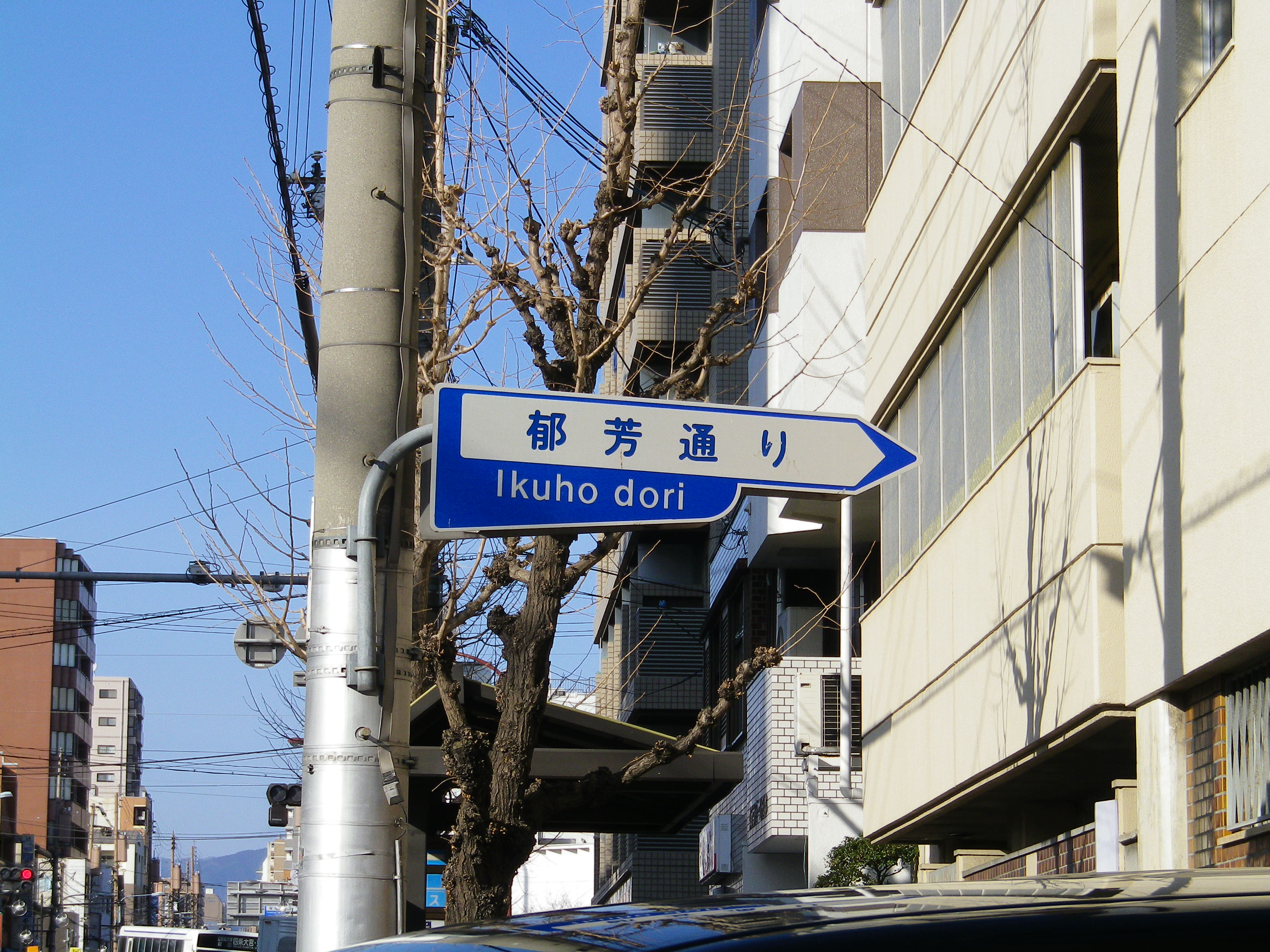 郁芳通の標識